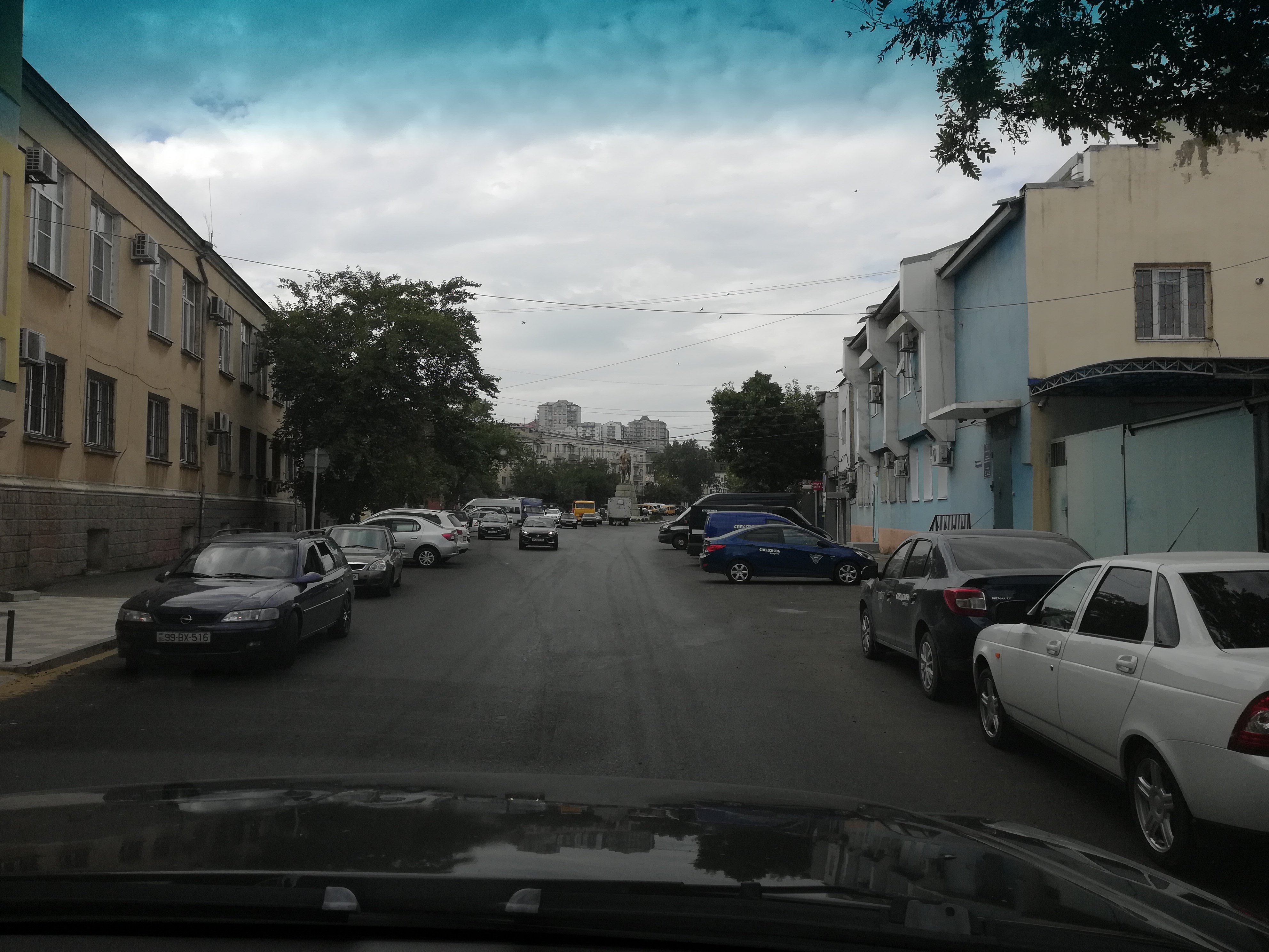 Махачкала. Улица Валентина Эмирова